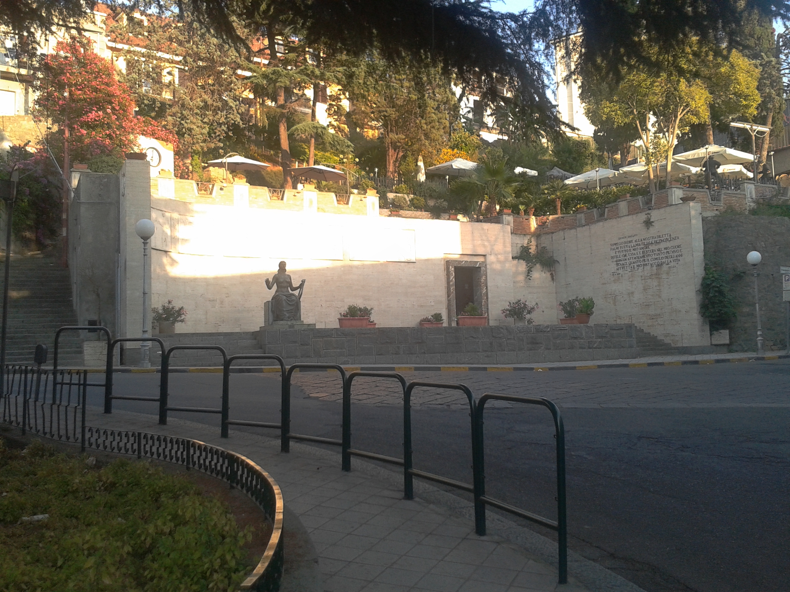 Palmi. Mausoleo dedicato a Francesco Cilea. Fotografia scattata dalla piazza Pentimalli